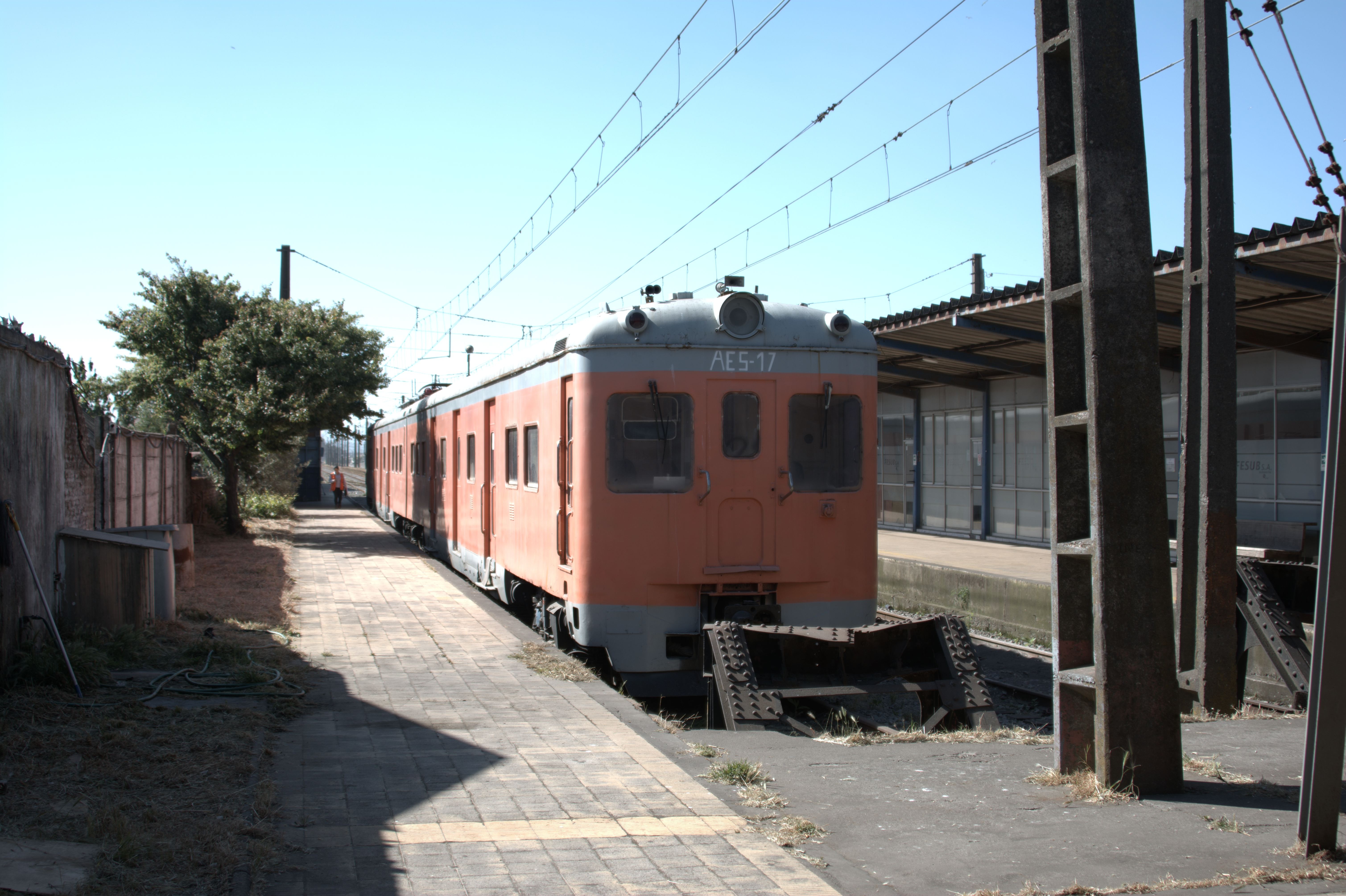 Locomotora AES-17 estacionada en la estación El Arenal, Talcahuano. Concepción, diciembre de 2019